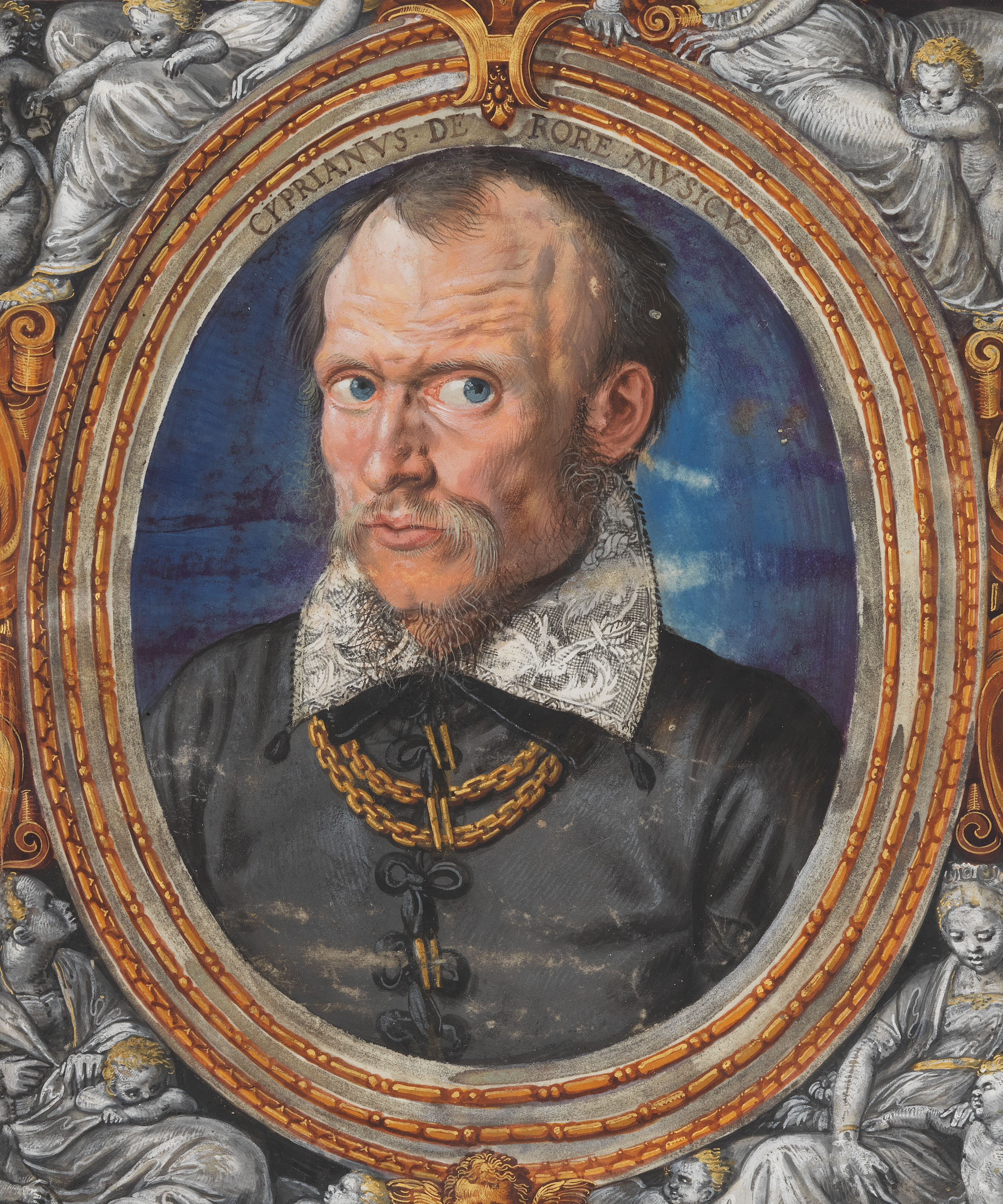 Cypriaan De Rore by Hans Müelich